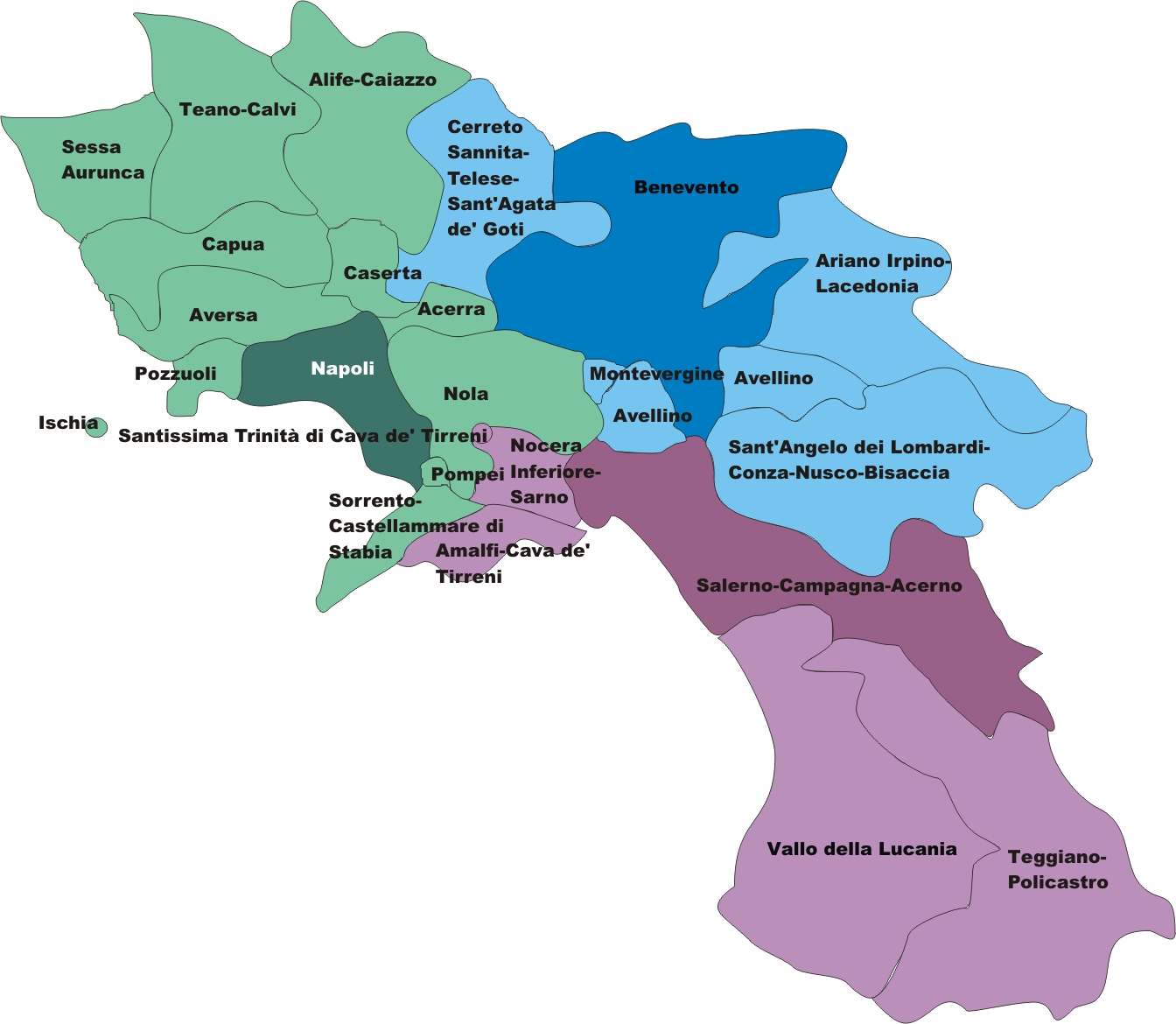 Mapa de la regió eclesiàstica de Campania